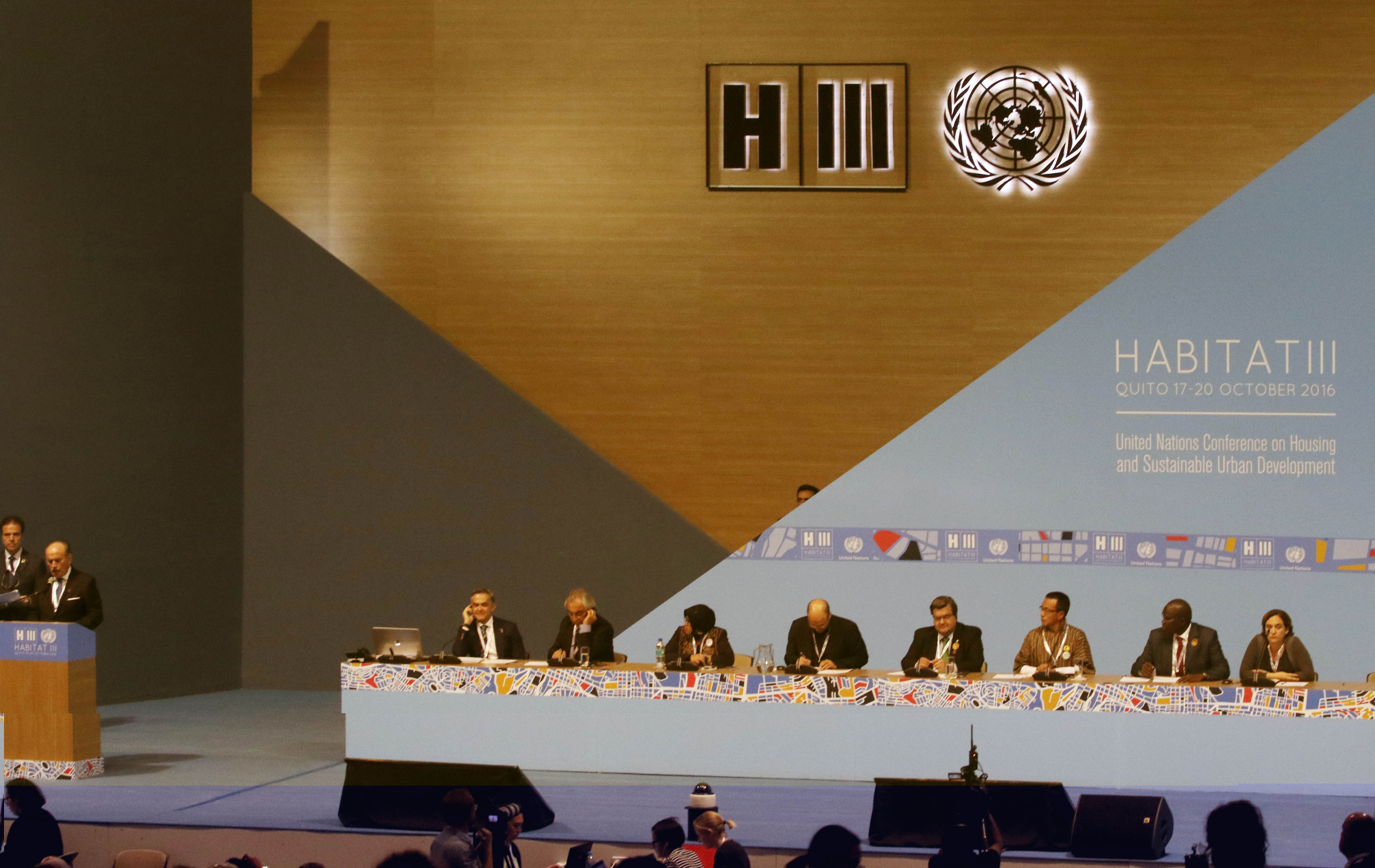 Quito, 16 oct (Andes).- Se inauguró la primera Asamblea de Alcaldes en el marco de Hábitat III. ANDES/Micaela Ayala V.